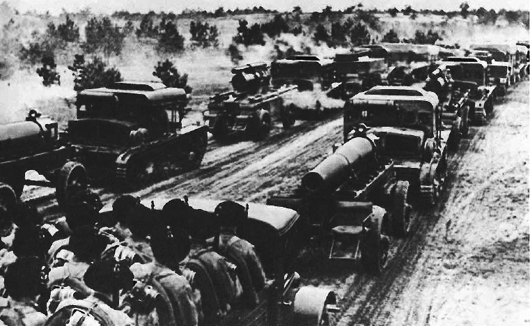 7CP i moździerz wz. 32